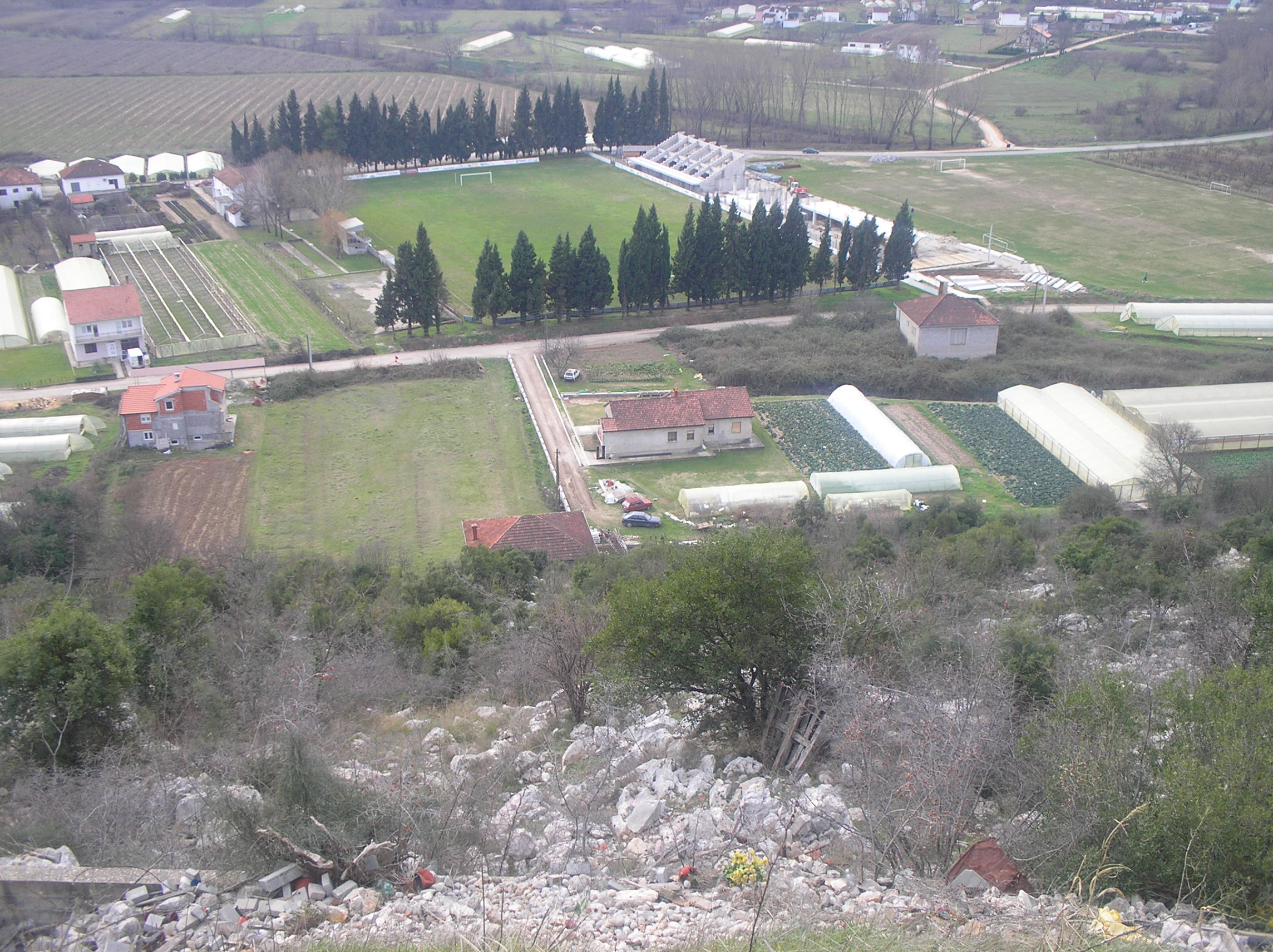 Stadion